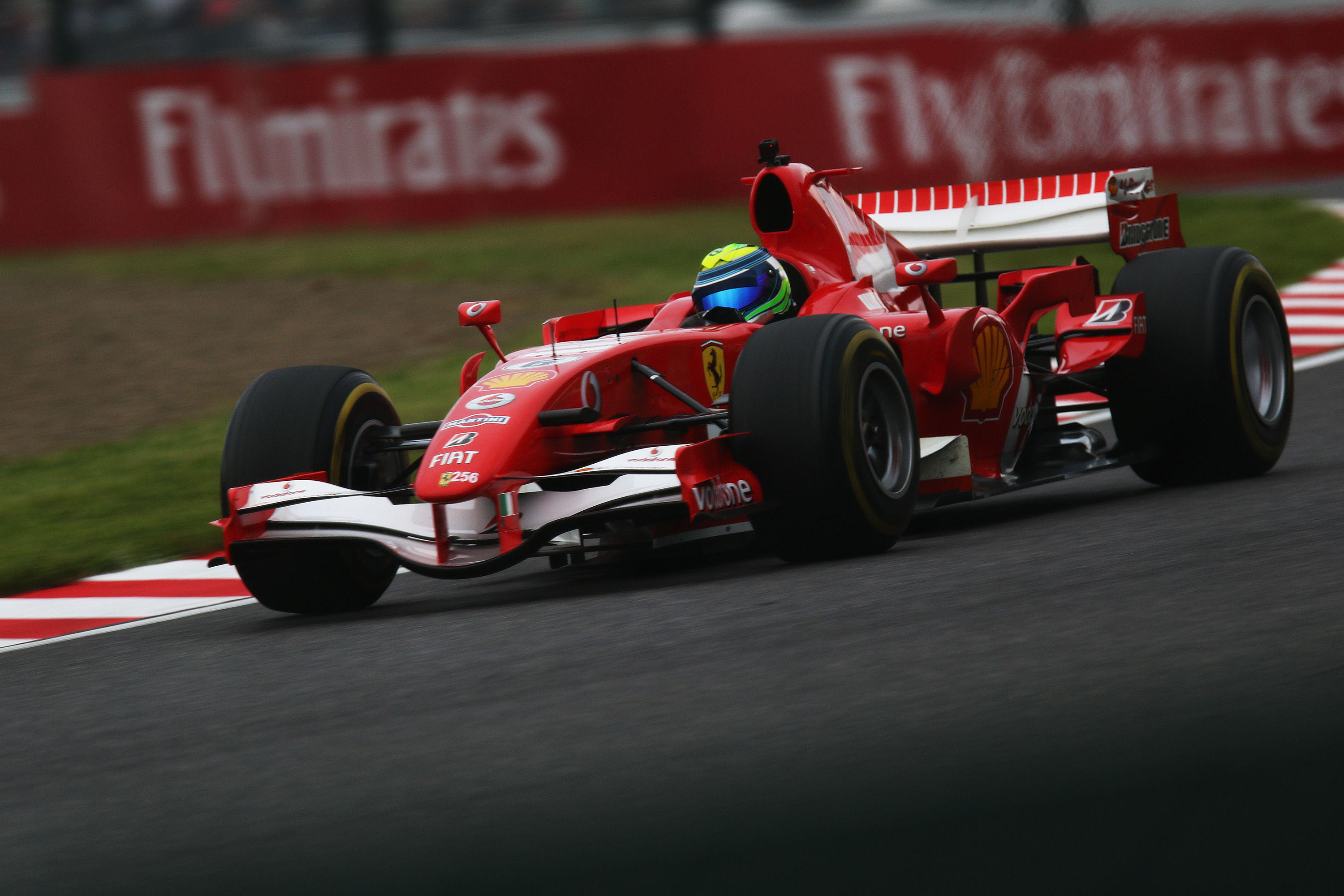 Felipe Massa Ferrari 248 F1 2018 Japanese Grand Prix.